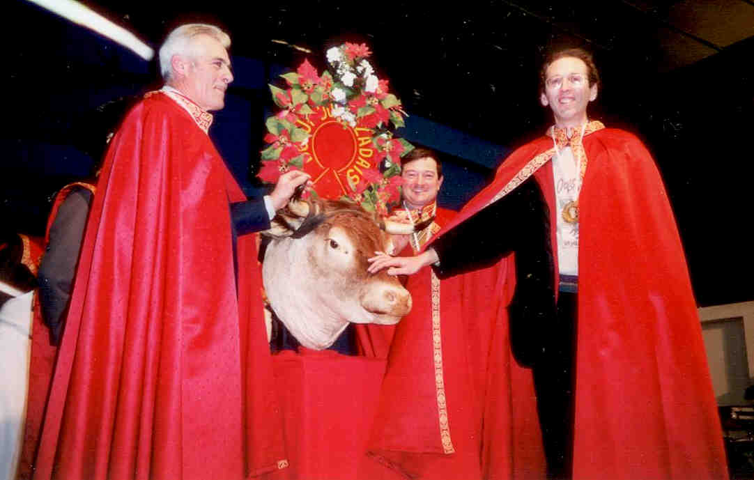 Le 11 février 1999, Basile Pachkoff (à droite) est intronisé dans la Confrérie bazadaise du Bœuf. Les deux autres reçus présents sur la photo sont MM. Remaut et Laffiteau. Le journal Sud-Ouest du 13 février 1999 a rapporté l'évènement.